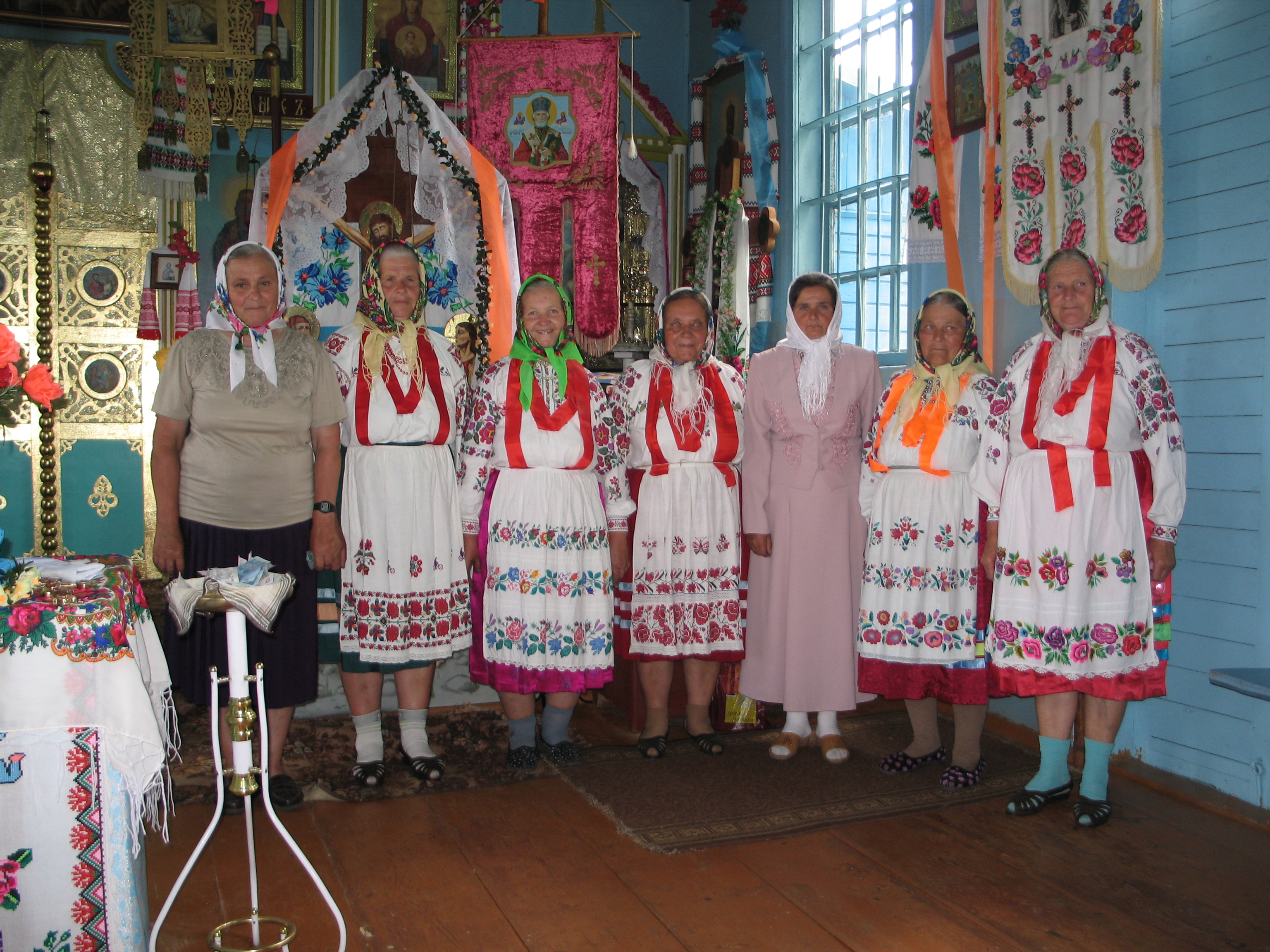 Хор церкви УПЦ села Бучин